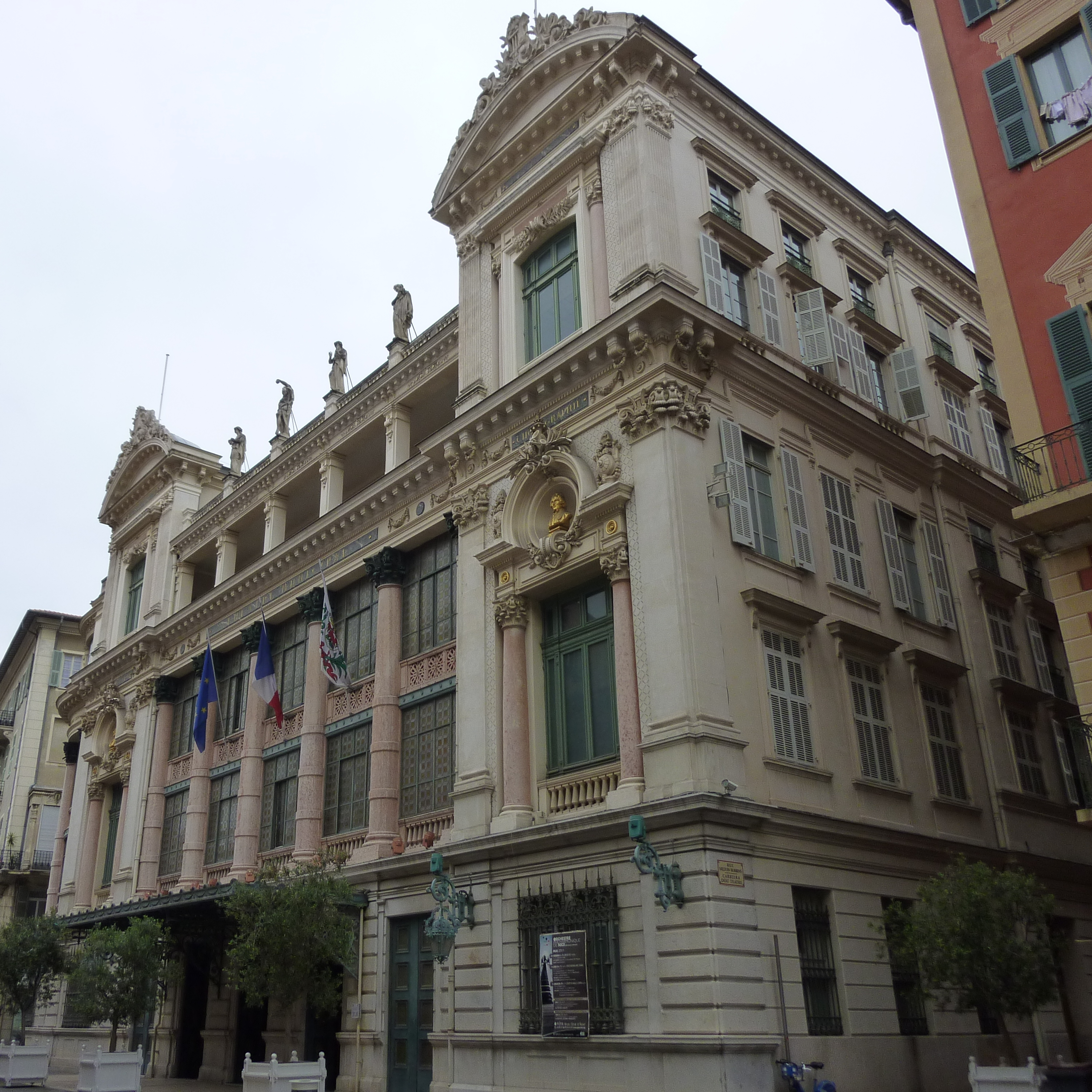 L'opéra de Nice vu depuis la rue Saint-François-de-Paule (Alpes-Maritimes, France) .